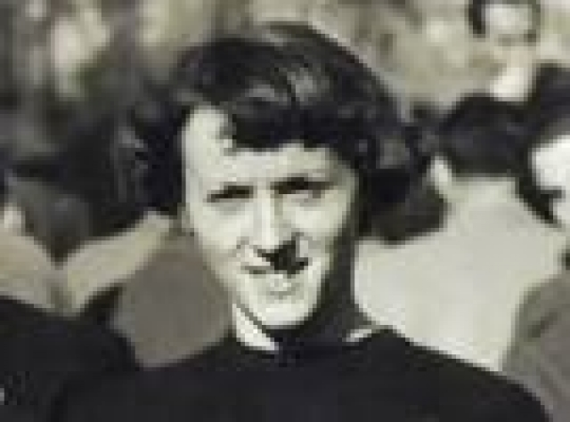 cestista italiana